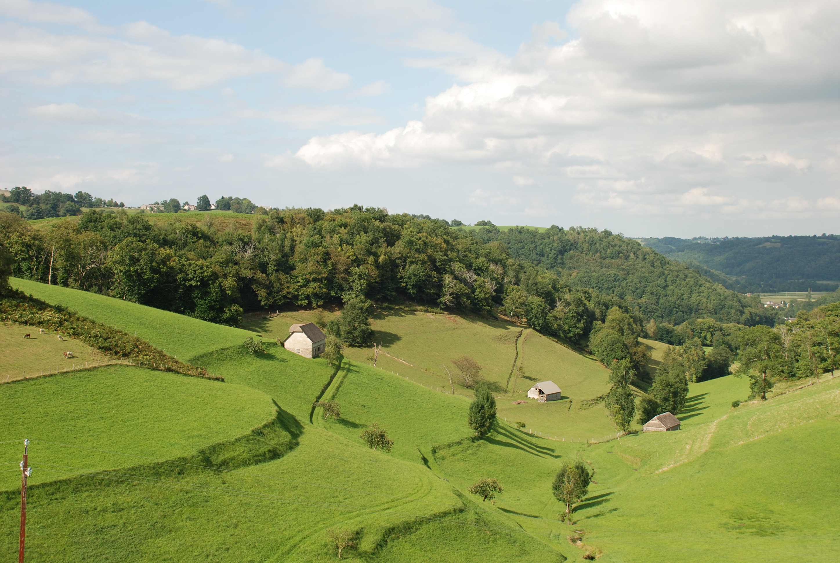 Granges foraines dans le canton de Lourdes-Est, au dessous de Gez ez Angles